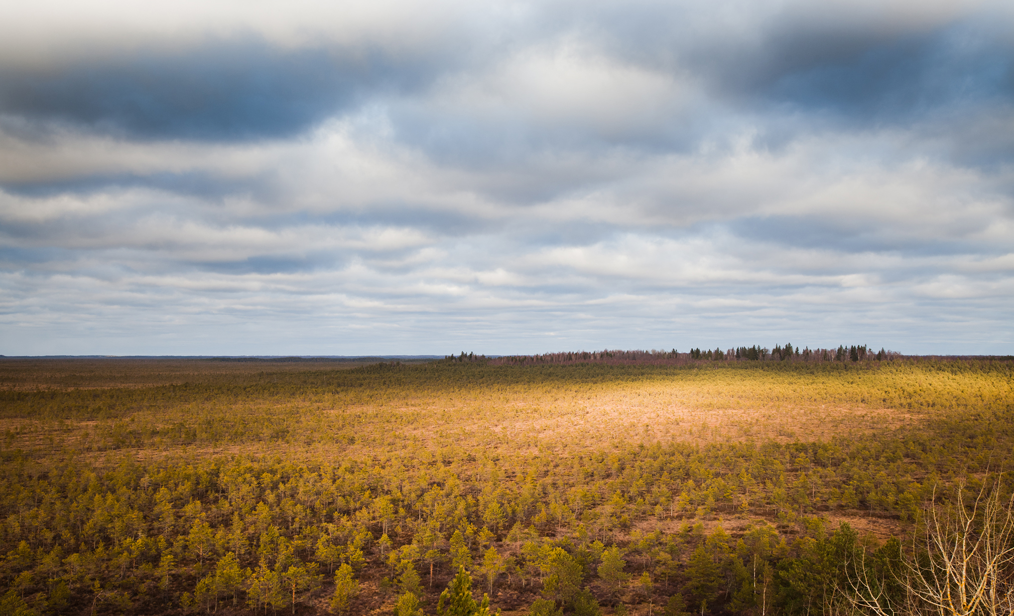 Krustakroga skatutornis